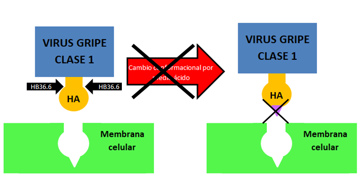 La proteína HB36.6 se une a la región HA del virus de la gripe de clase 1 por su tronco. Esta unión inhibe la futura modificación de esta región cuando entre en medio ácido. Es por eso que no podrá acoplarse con la célula y, en consecuencia, no se producirá su infección.